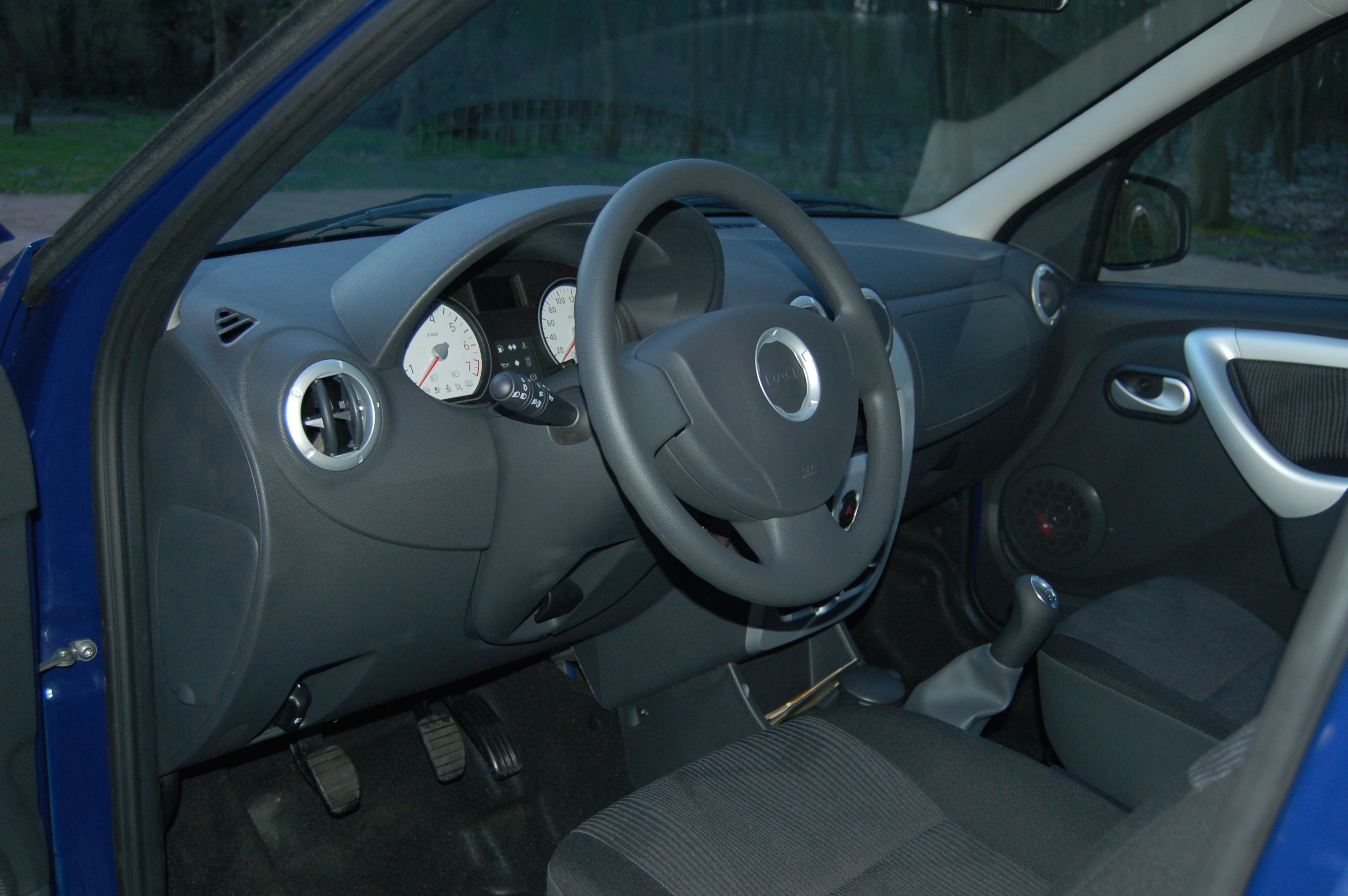 Blick in den Innenraum des Dacia Logan MCV Lauréate Modell 2009, die Innenausstattung ist baugleich mir der des Dacia Sandero Lauréate.